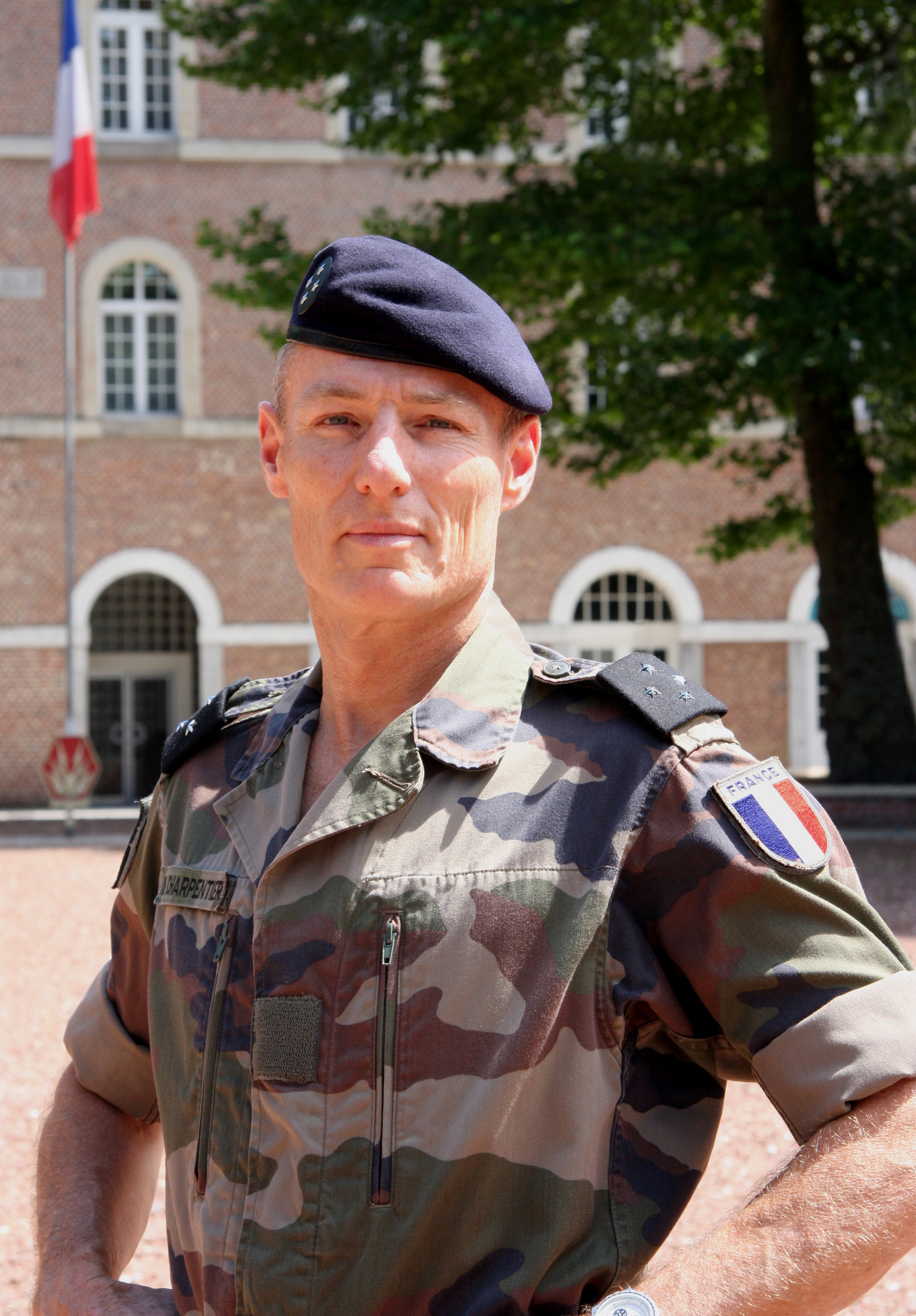 Général Hervé Charpentier